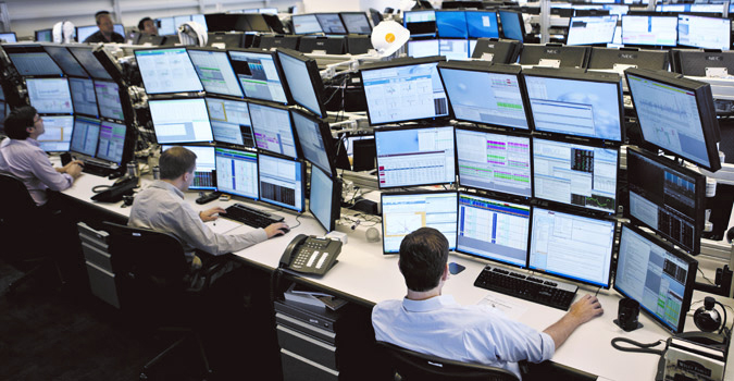 Cette photo a été prise dans la salle de trading de JUSTRADER, société de courtage en bourse.